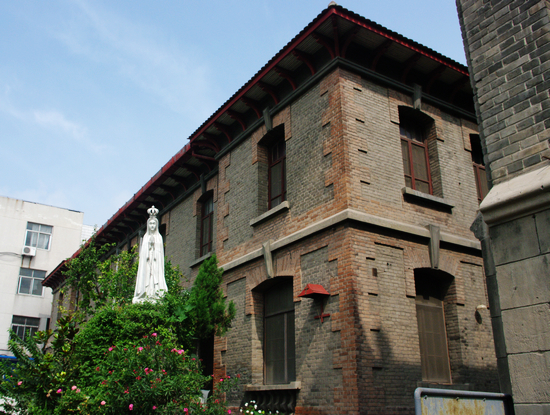 河南开封河南总教区主教府